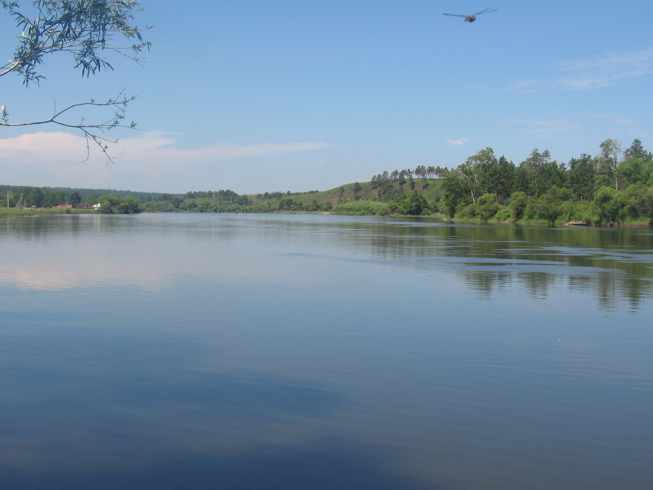 д.Баклаши